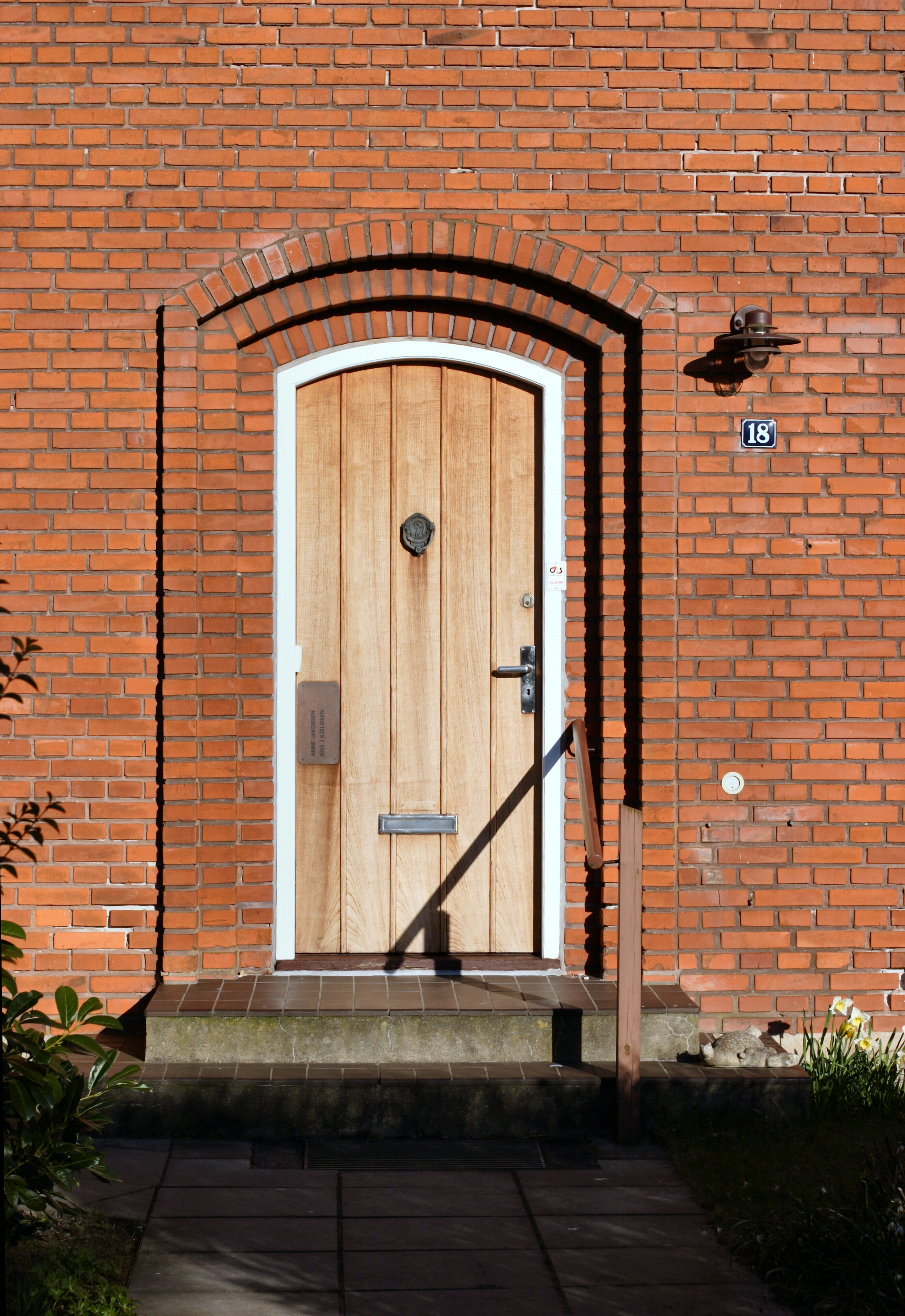 Dørparti i muermestervilla, Risskov